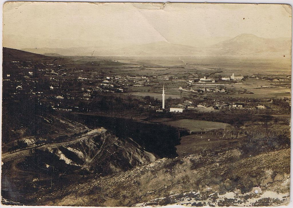 Негорци през Първата световна война в 1916 година.